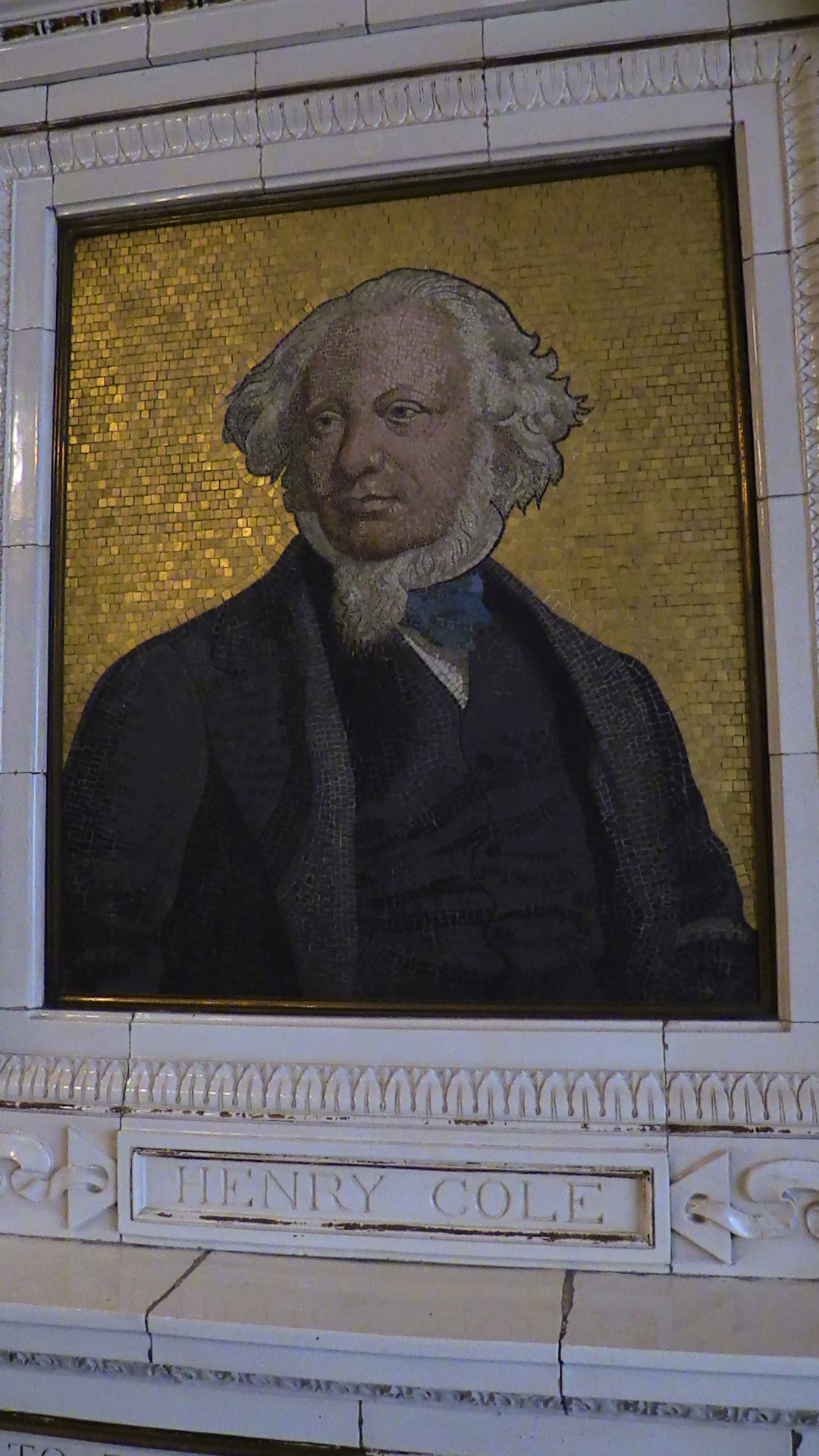 Аҧсшәа